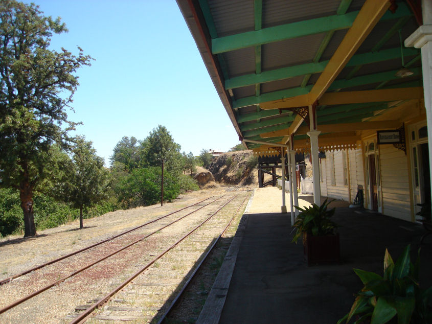 Gundagai Platform